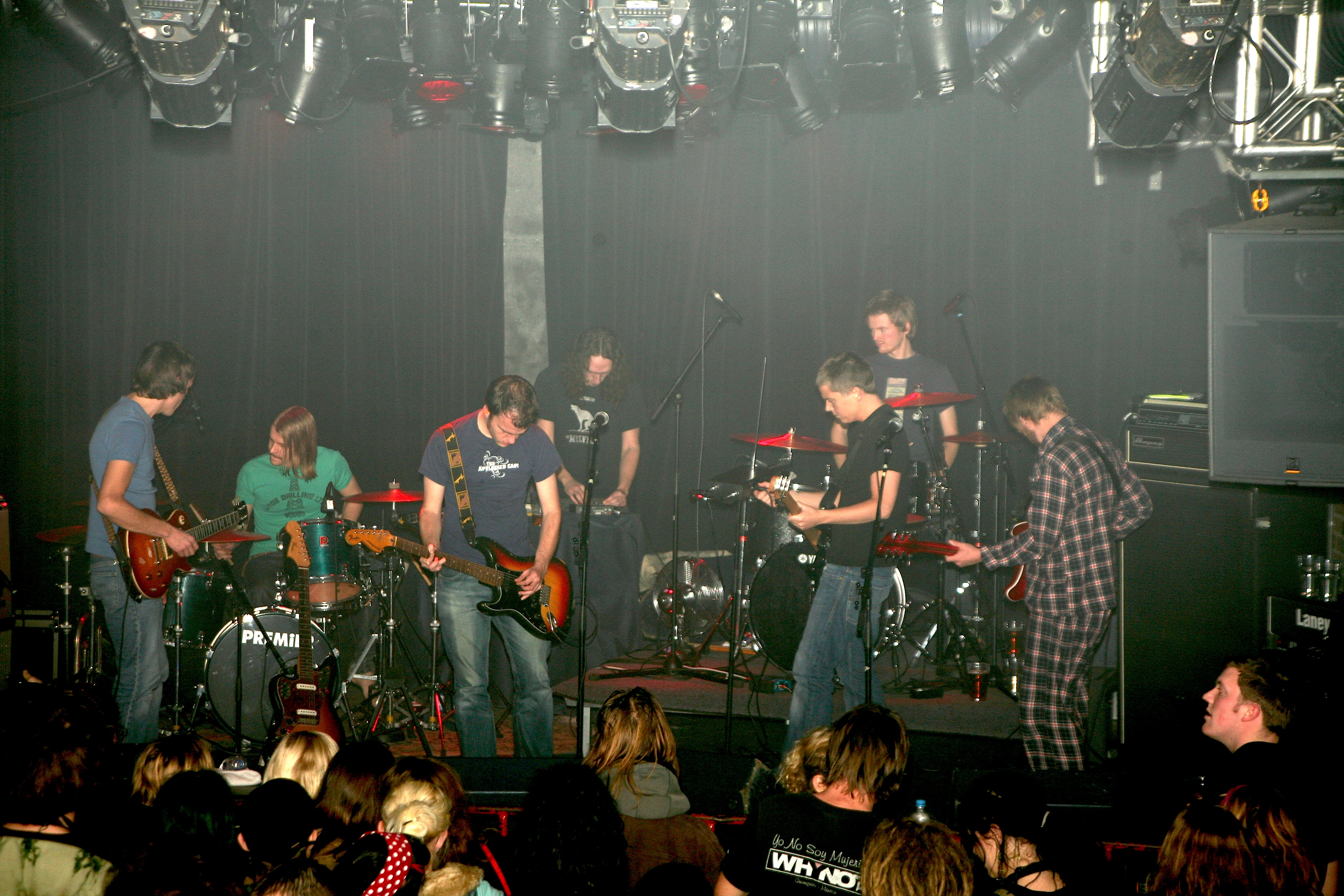 Syntax Ether Demo Trommer: Ronny og Atle, Støy:Kevin, Bass: Hein, Gitar:Knut Olav, Gitar/vokal: Gunnar og Knut Andreas. Foto: Torstein Aldin Thune